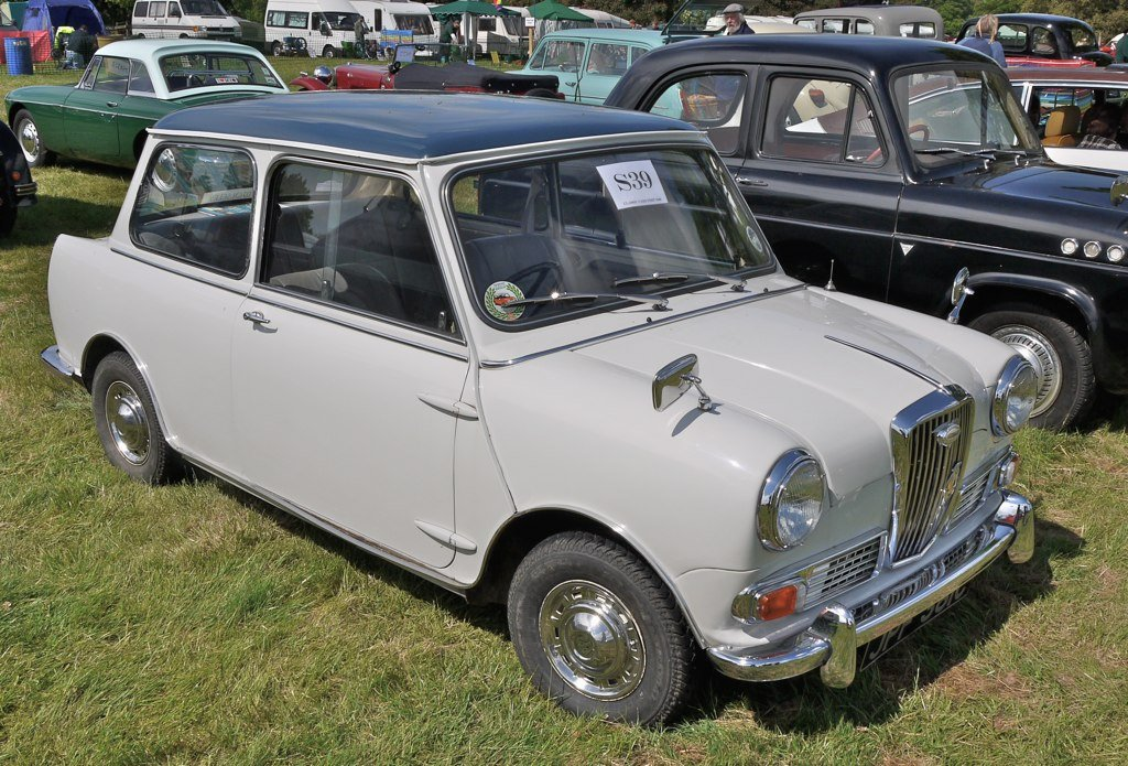 Panasonic G1 14-45 Lens